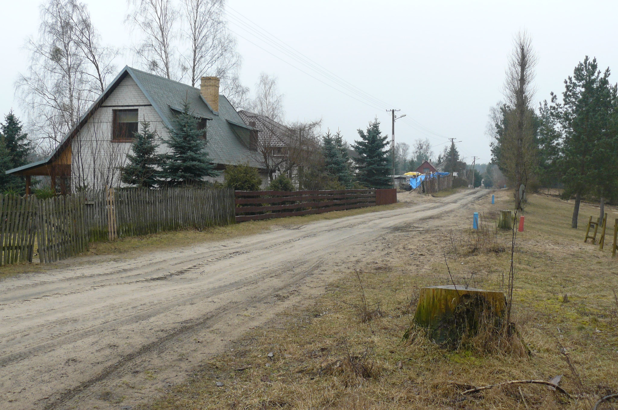 Marylin, gm. Drawsko.